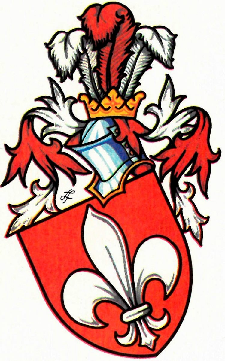 Erb moravského rodu pánů ze Zástřizl